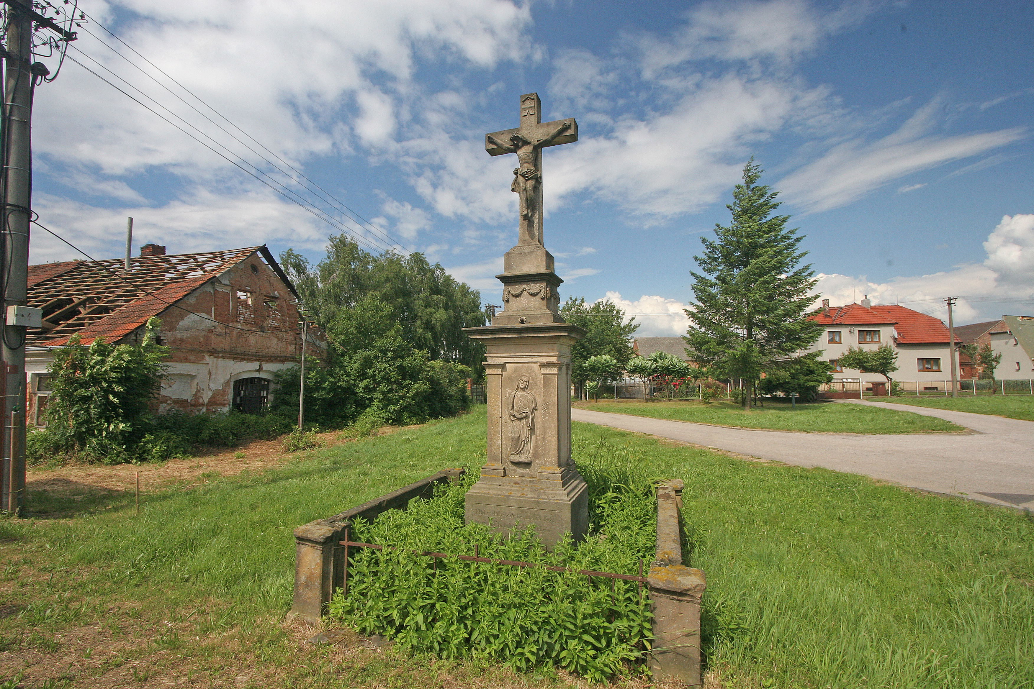 Klenice křížek